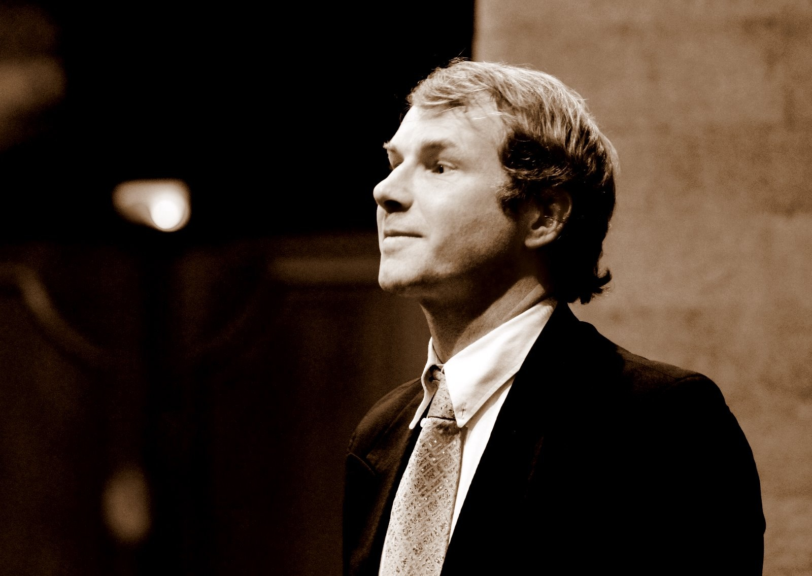 Photo de Francis Jacob après un concert à Nice